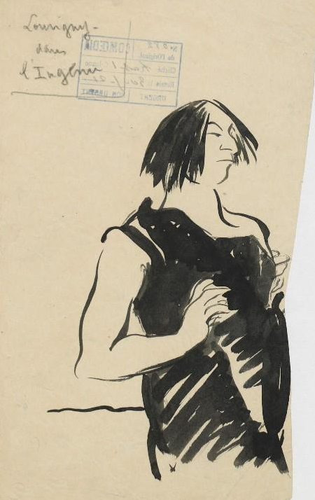 Jacques Louvigny dans "L'Ingénu" : caricature